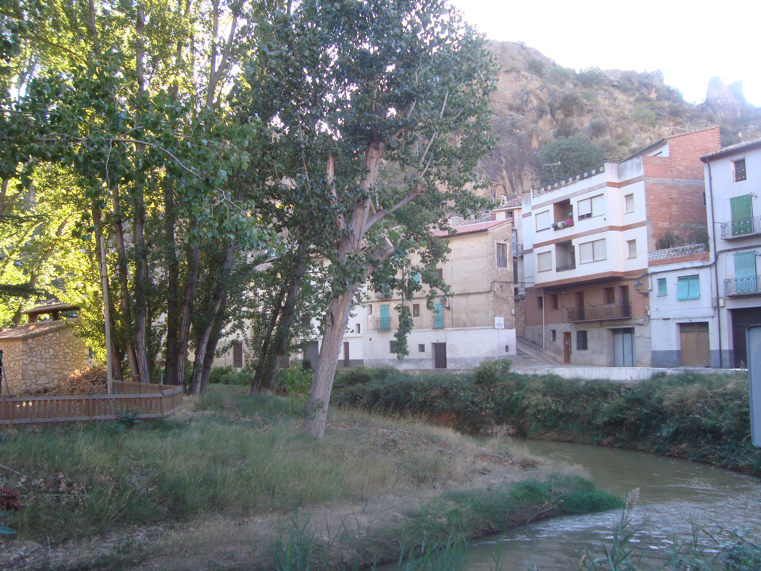 Libros (Teruel).Libros es una localidad y municipio de la provincia de Teruel, en Aragón, España. Está situada a orillas del río Turia y a 26 Km de su capital de provincia, Teruel.